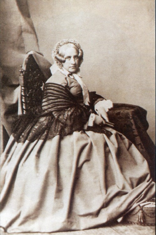 Софья Алексеевна Перовская (21.05.1811-02.02.1883), жена князя В. В. Львова (1804—1856), писателя, цензора.